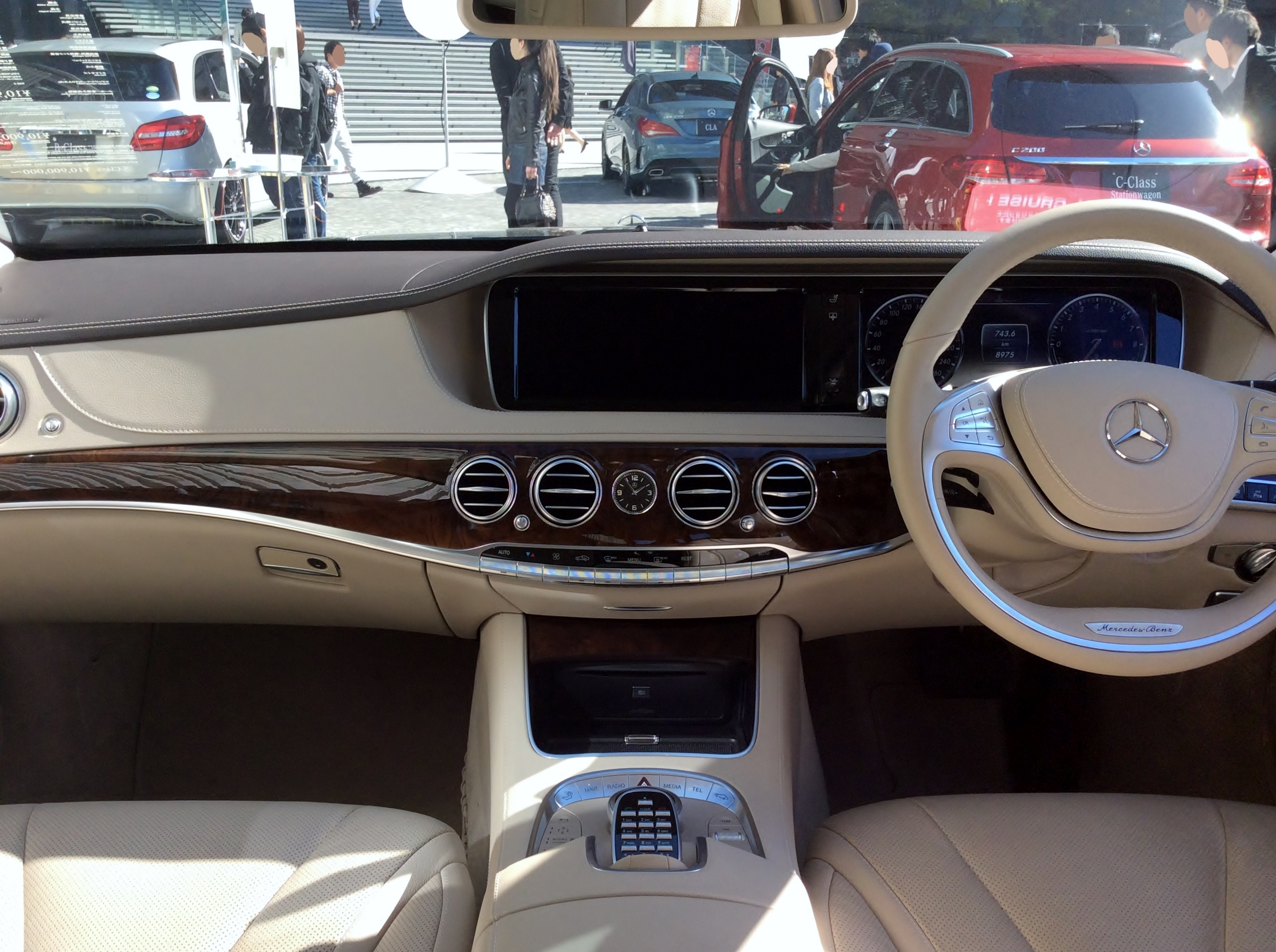 W222型メルセデス・ベンツS400ハイブリッドのインテリアを撮影。